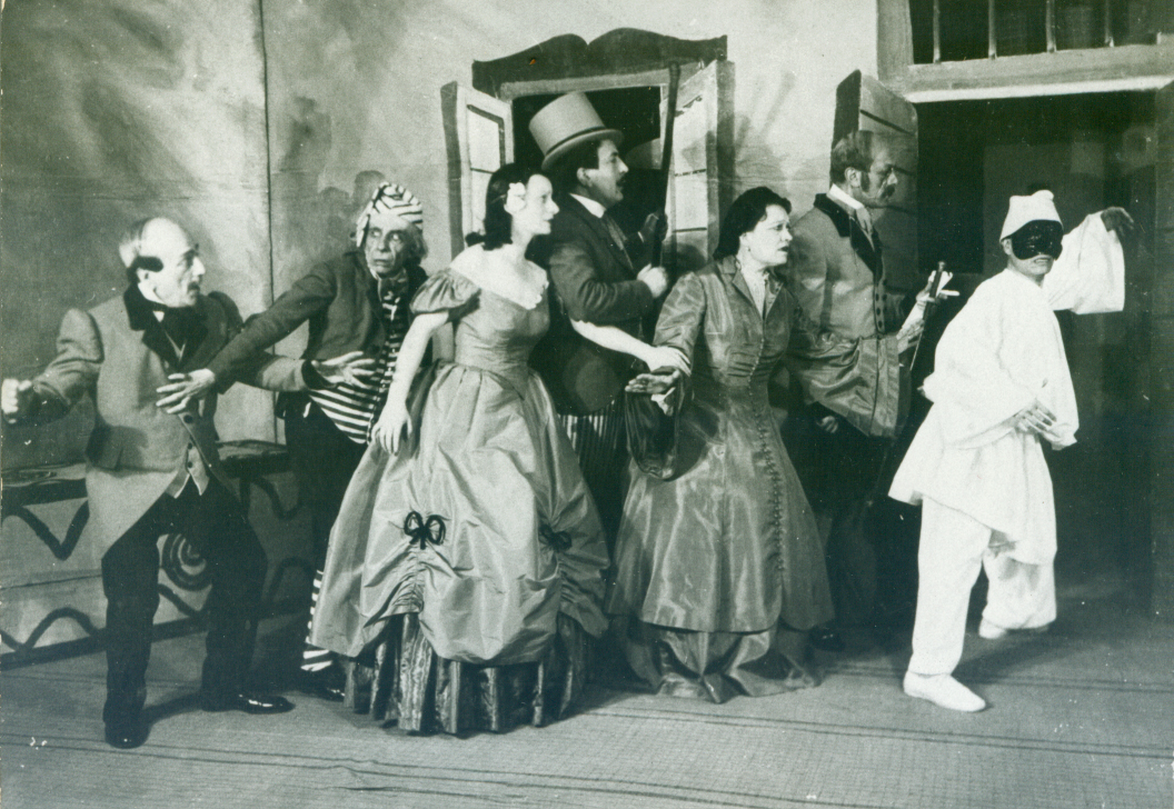 Foto di scena di mia proprietà di Siamo tutti fratelli da Petito